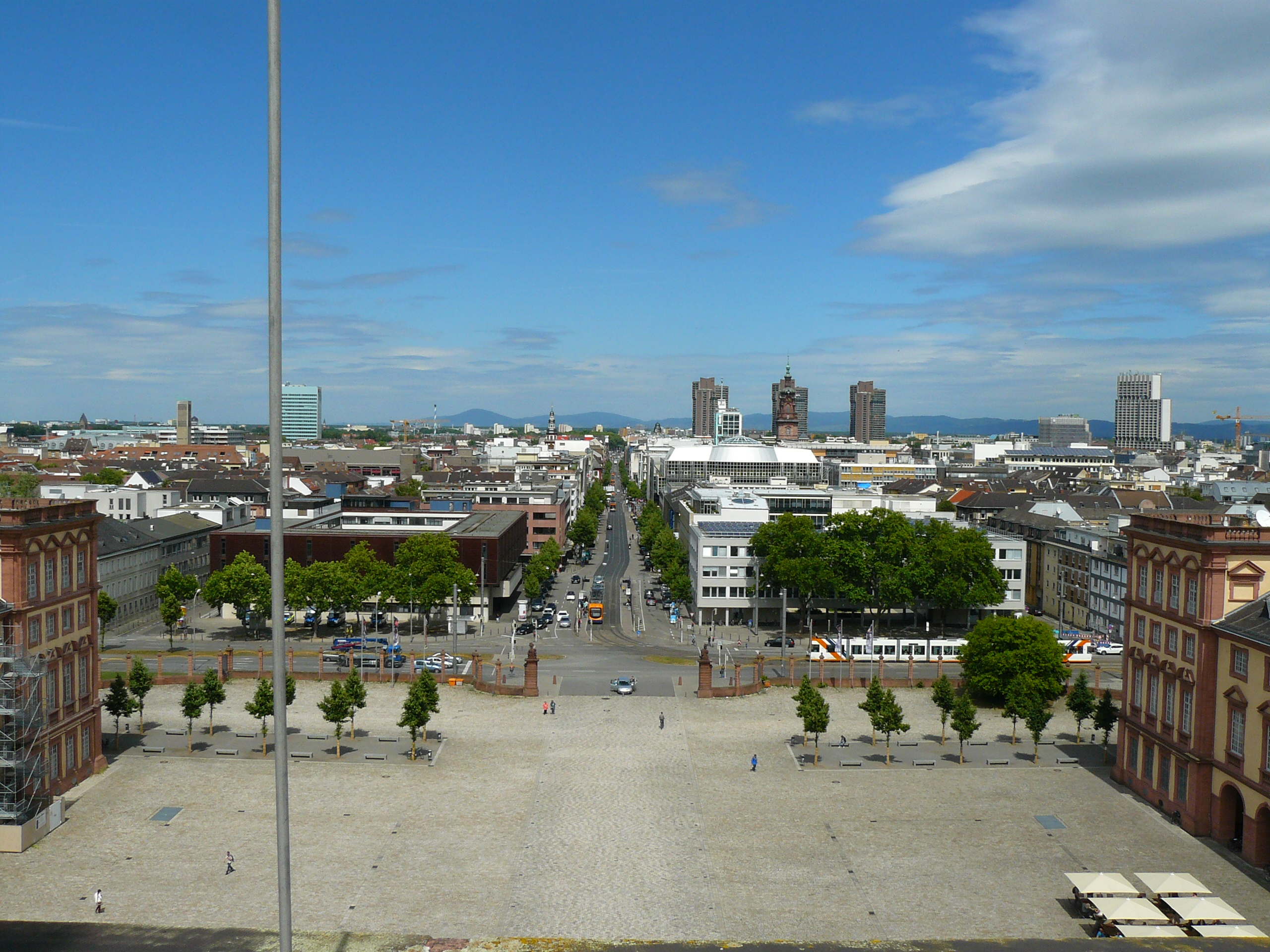 Blick vom Schlossturm (Mittelbau) nach Norden auf Ehrenhof und Breite Straße